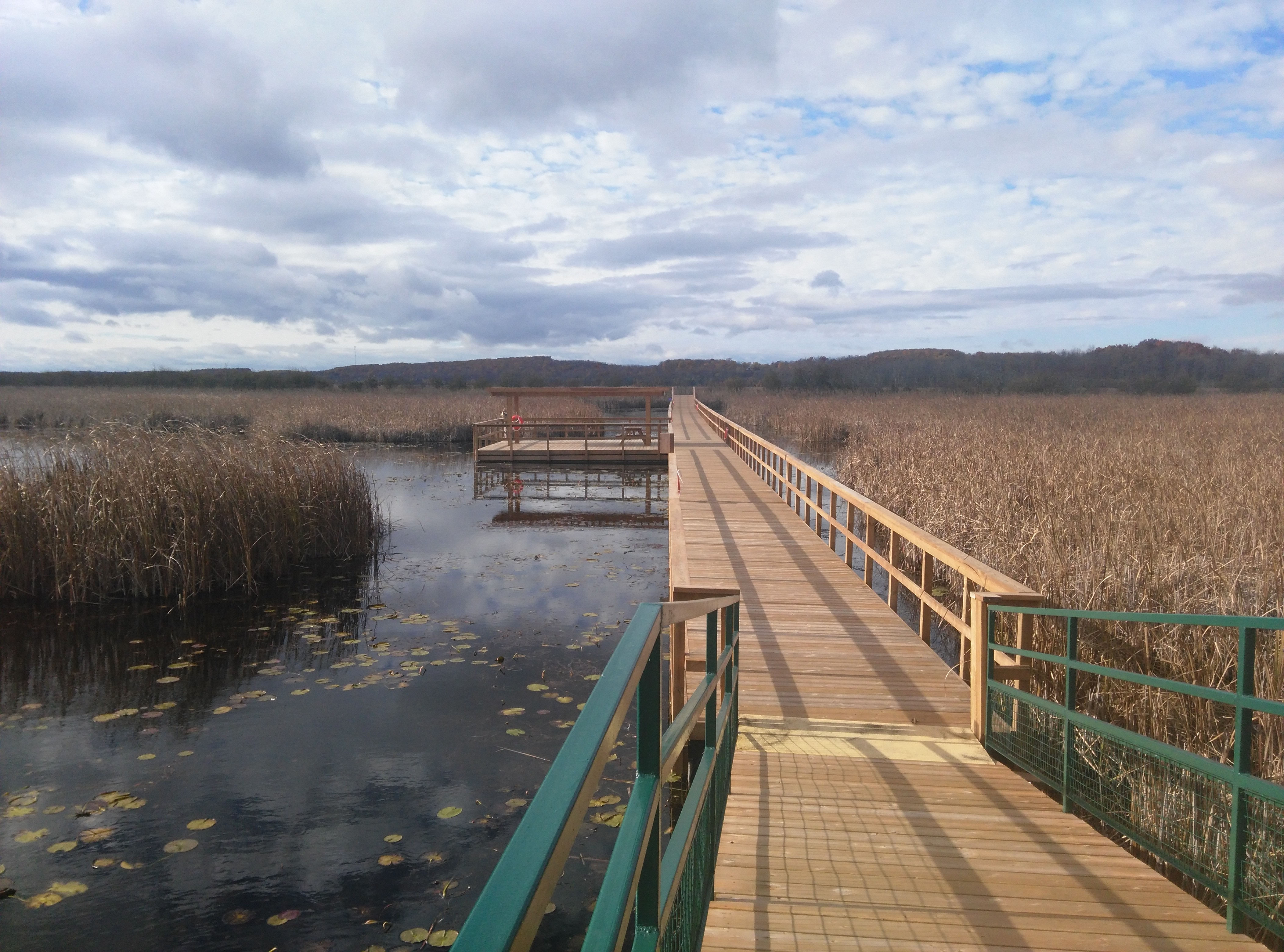 Wye Marsh